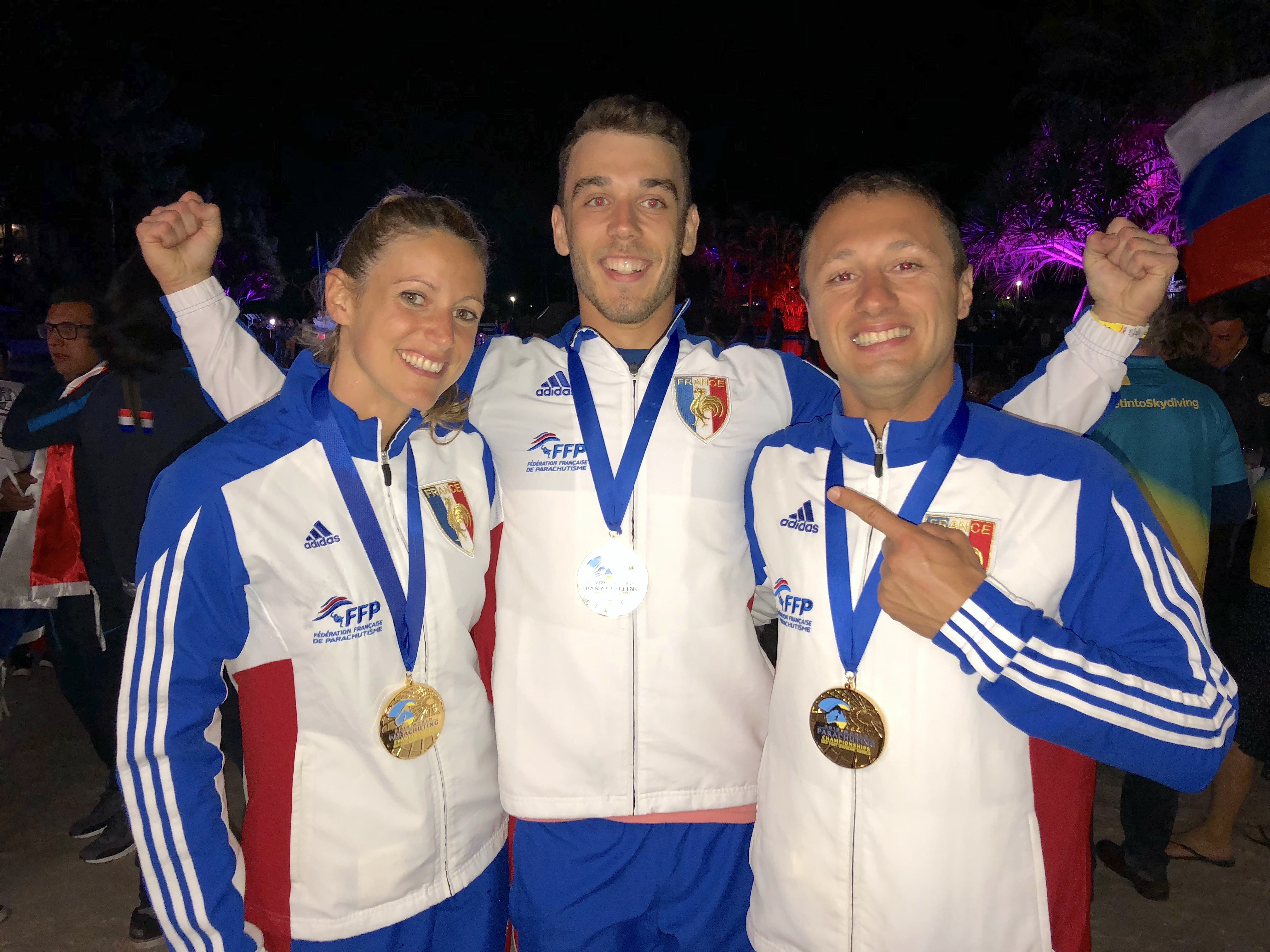 Greg Crozier, Karine Joly et Baptiste Welsch Equipe de France 2018 Championne du Monde